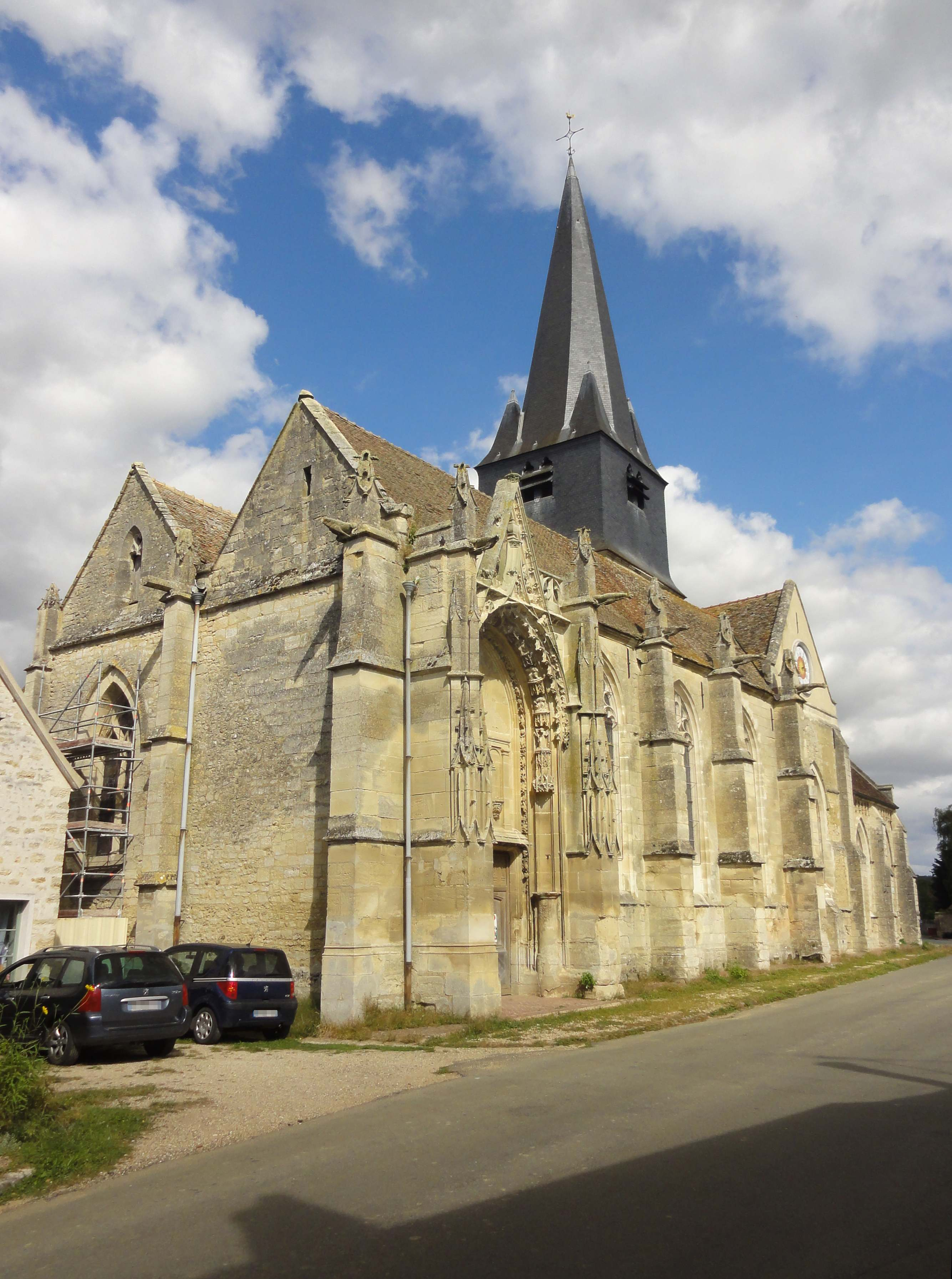 Vue depuis le sud-ouest.